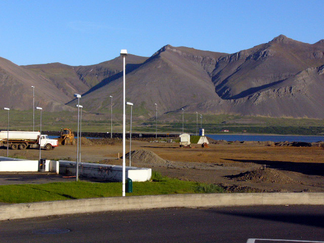 Borgarnes, view to Skálarfjall.